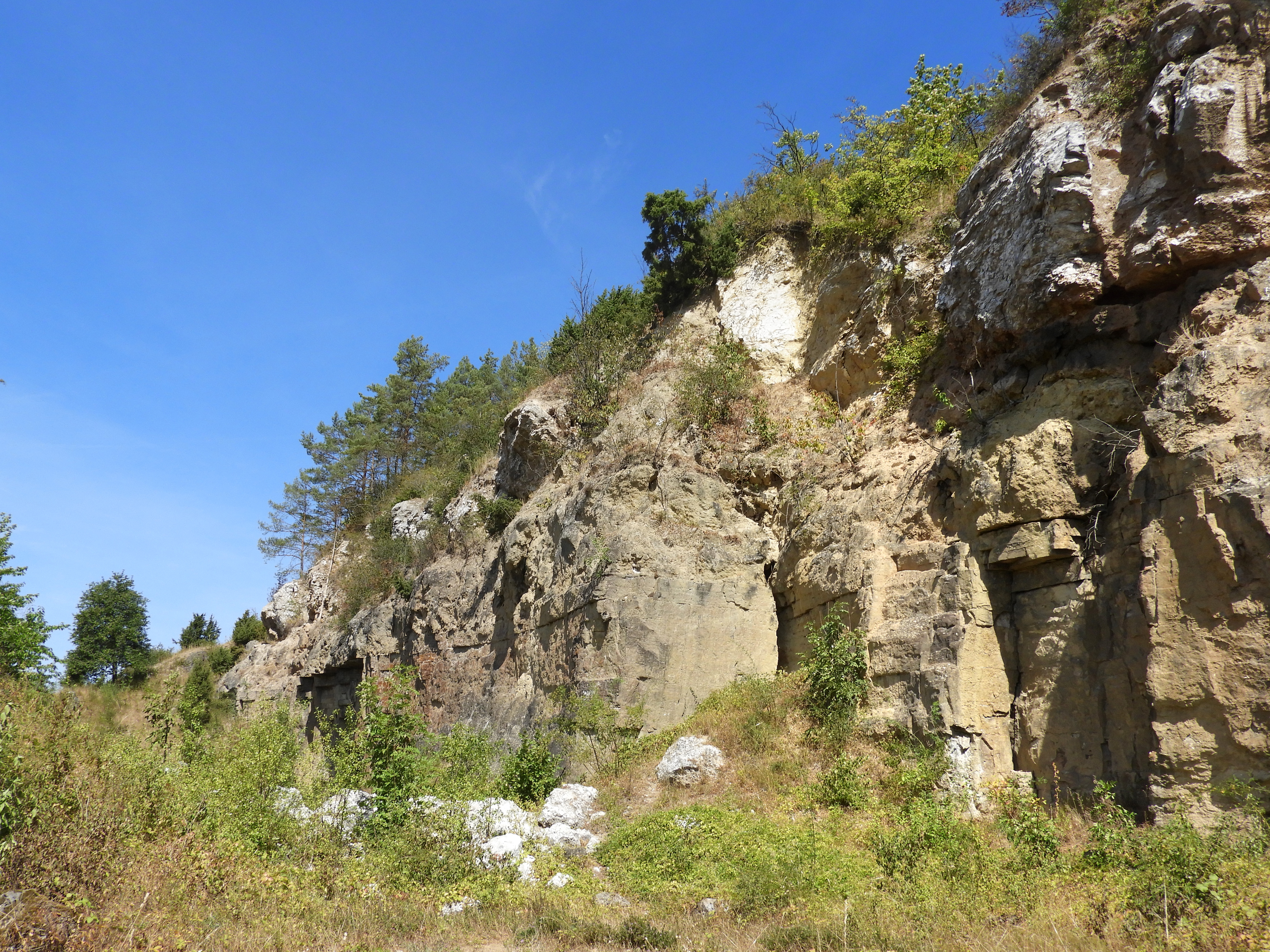 Aufgelassener Steinbruch am Weinberg. Der „Jestädter Weinberg“ ist ein Zechsteinrücken am rechten Werraufer im nordhessischen Werra-Meißner-Kreis, dessen sichtbare Dolomitfelsen landschaftsprägend sind. Bereits in 1924 wurden in einer ersten Schutzverordnung sämtliche Felspartien als Naturdenkmale ausgewiesen. Seit 1979 ist der Bereich ein Naturschutzgebiet. Mit dem westlich angrenzendem Naturschutzgebiet „Werraaltarm und Werraaue bei Albungen“ bildet der Weinberg ein Fauna-Flora-Habitat-Gebiet im europäisch vernetzten Schutzgebietssystem Natura 2000 unter der Bezeichnung „Jestädter Weinberg / Werraaltarm und Werraaue bei Albungen“.